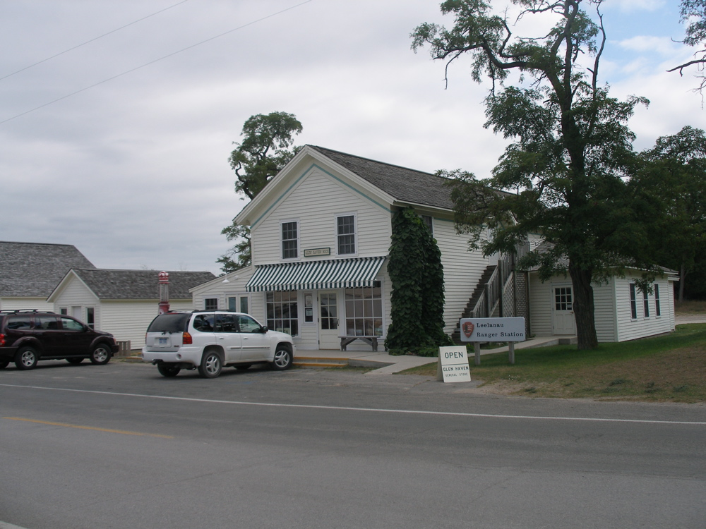 Glen Haven General Store, Glen Haven Michigan